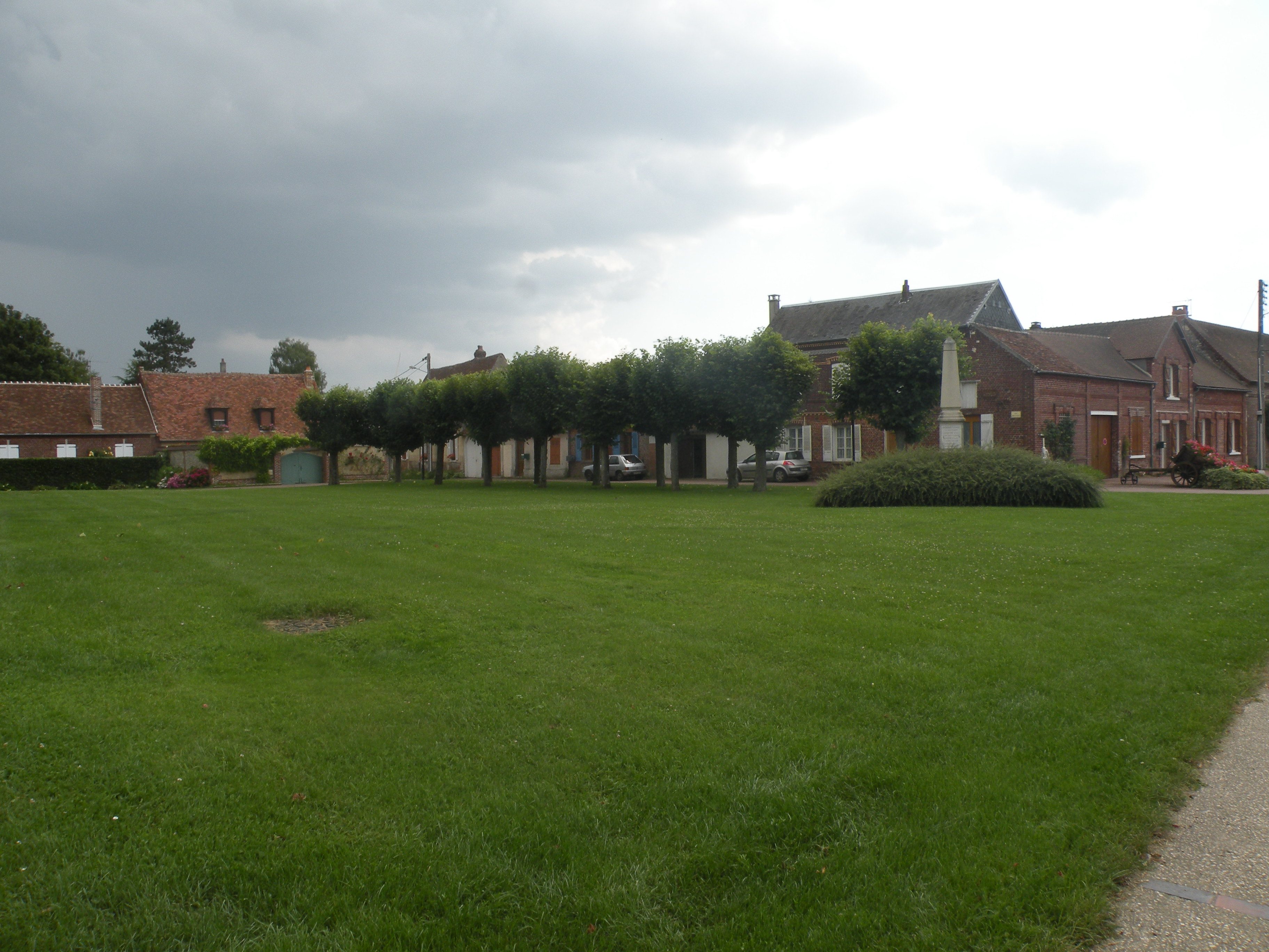 Rémérangles place de l'église